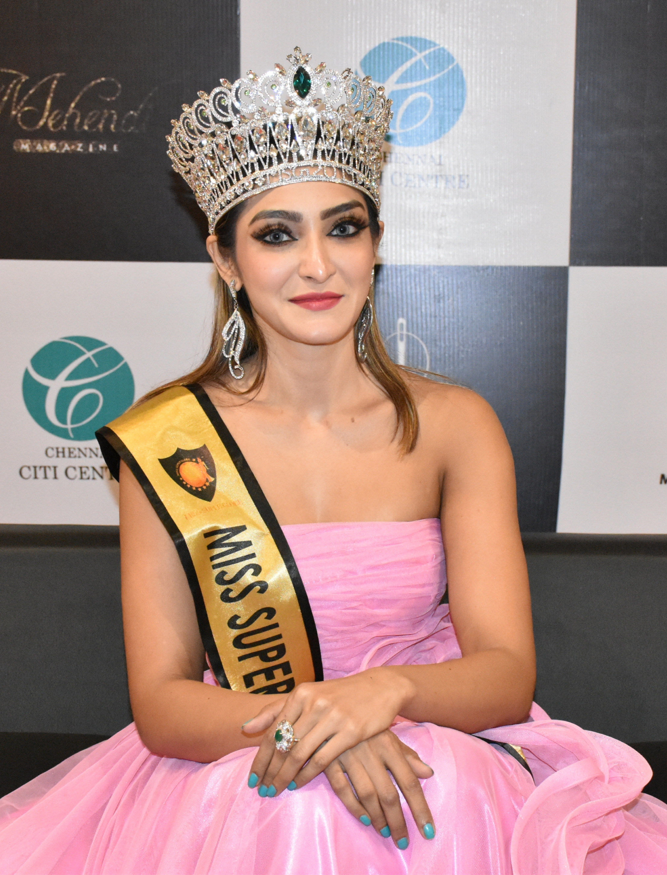 Akshara Reddy